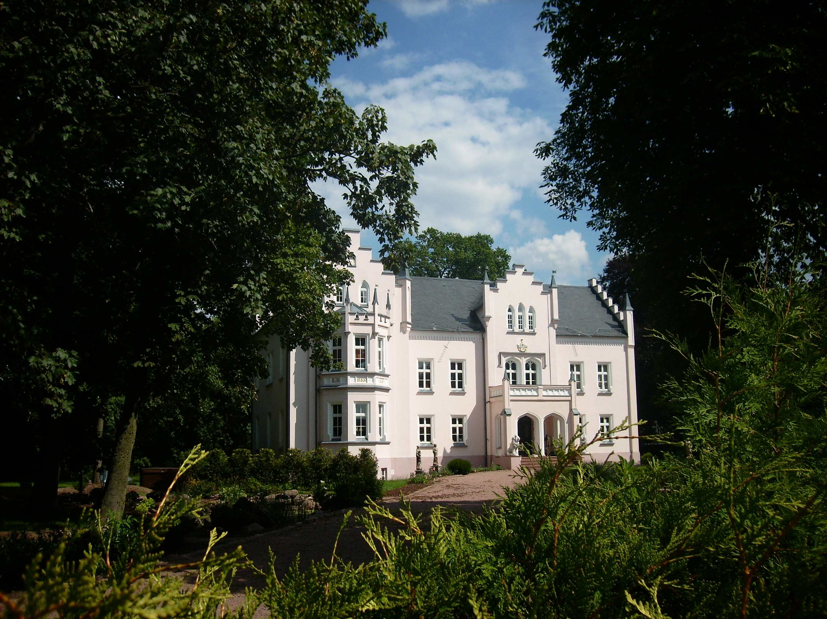 Schloß in Schköna (Dübener Heide, OT von Gräfenhainichen)